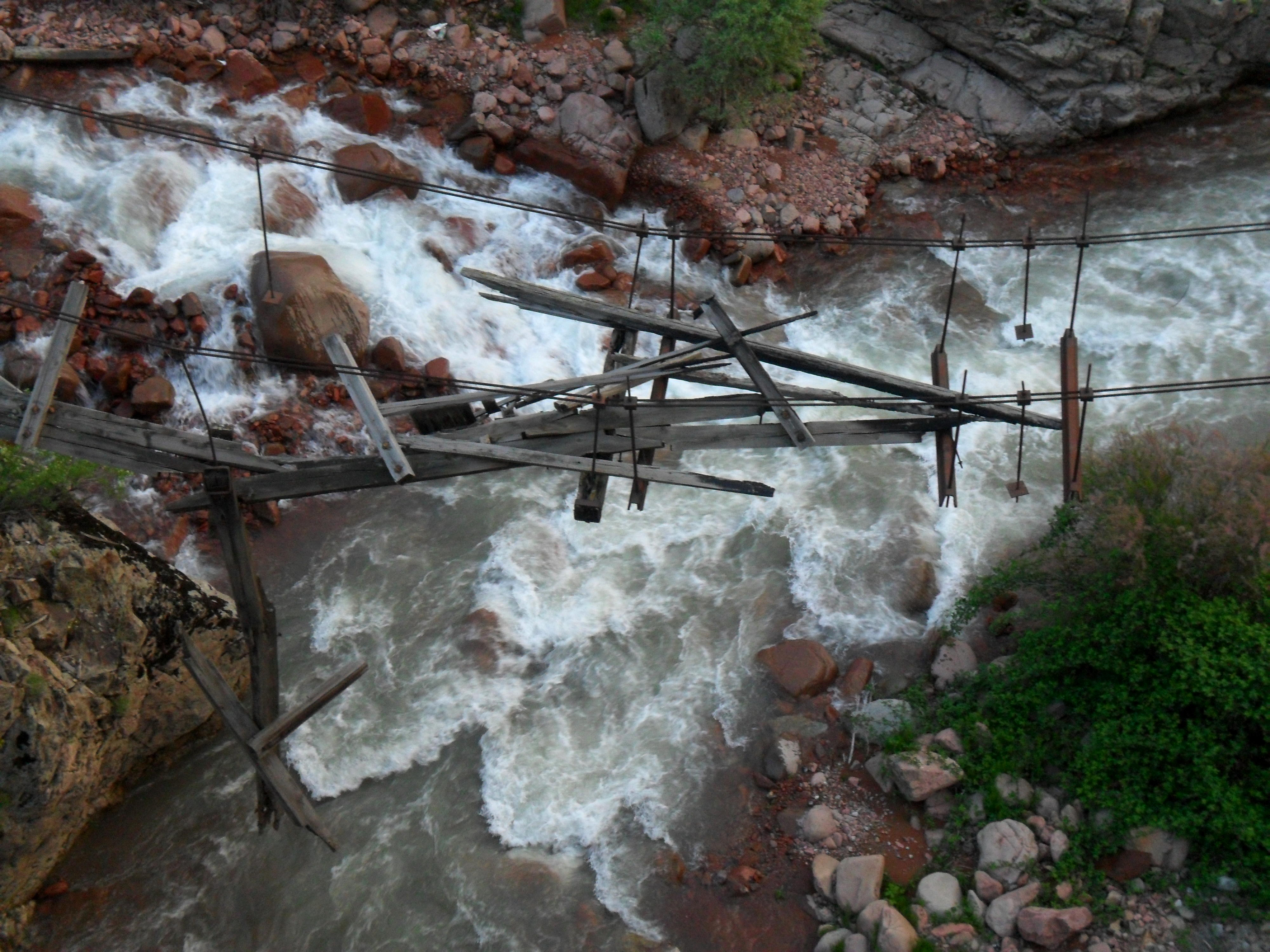 Впадение Джекиндека в Каттасай. Ташкентская область, Республика Узбекистан